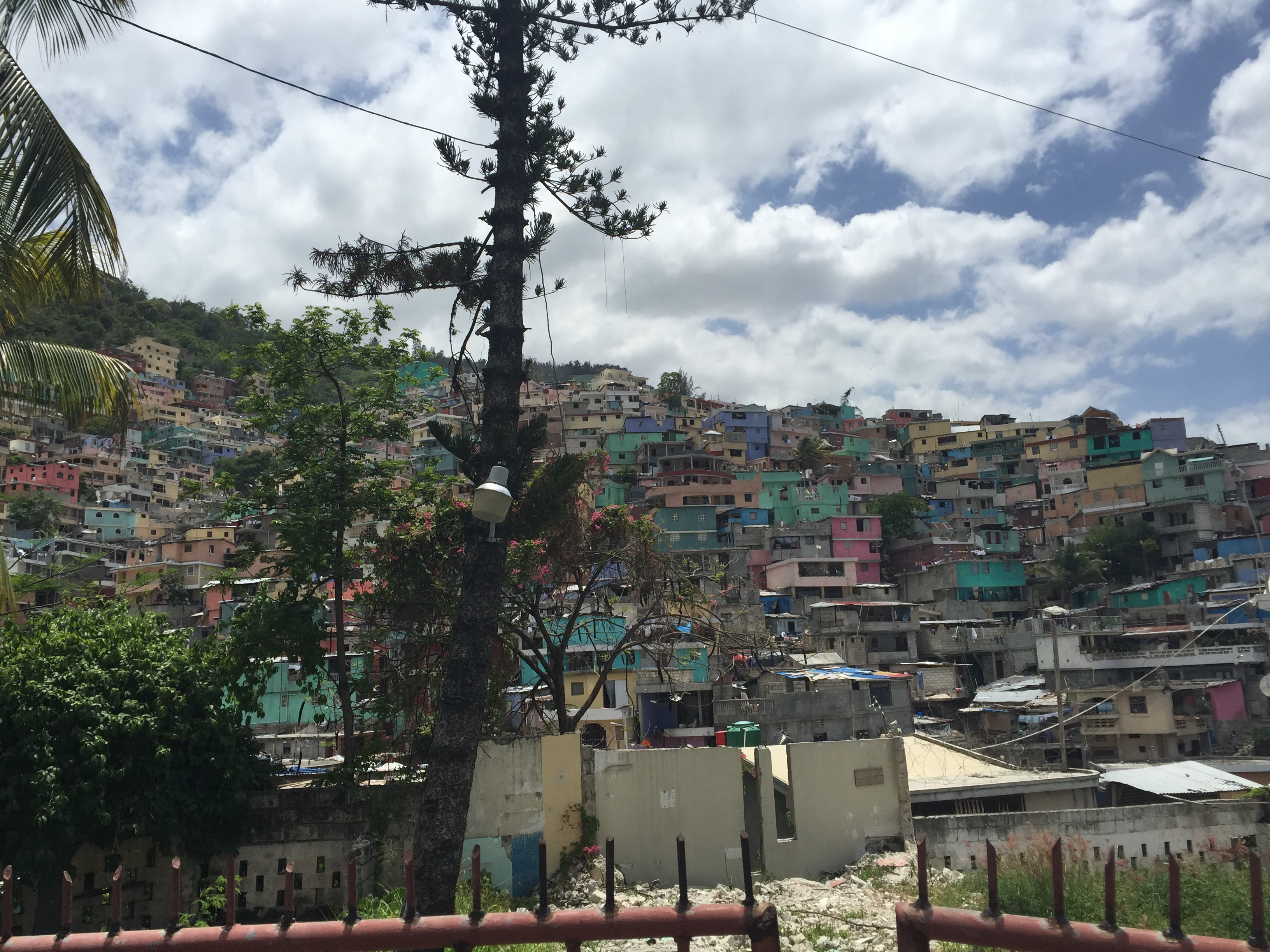 Petion-Ville, Haiti